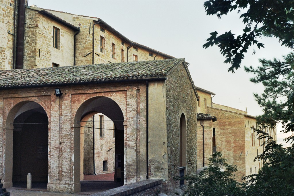 Il Palazzo Ducale è un monumento rinascimentale della città di Camerino, nelle Marche. Sede dell'Università degli Studi di Camerino.